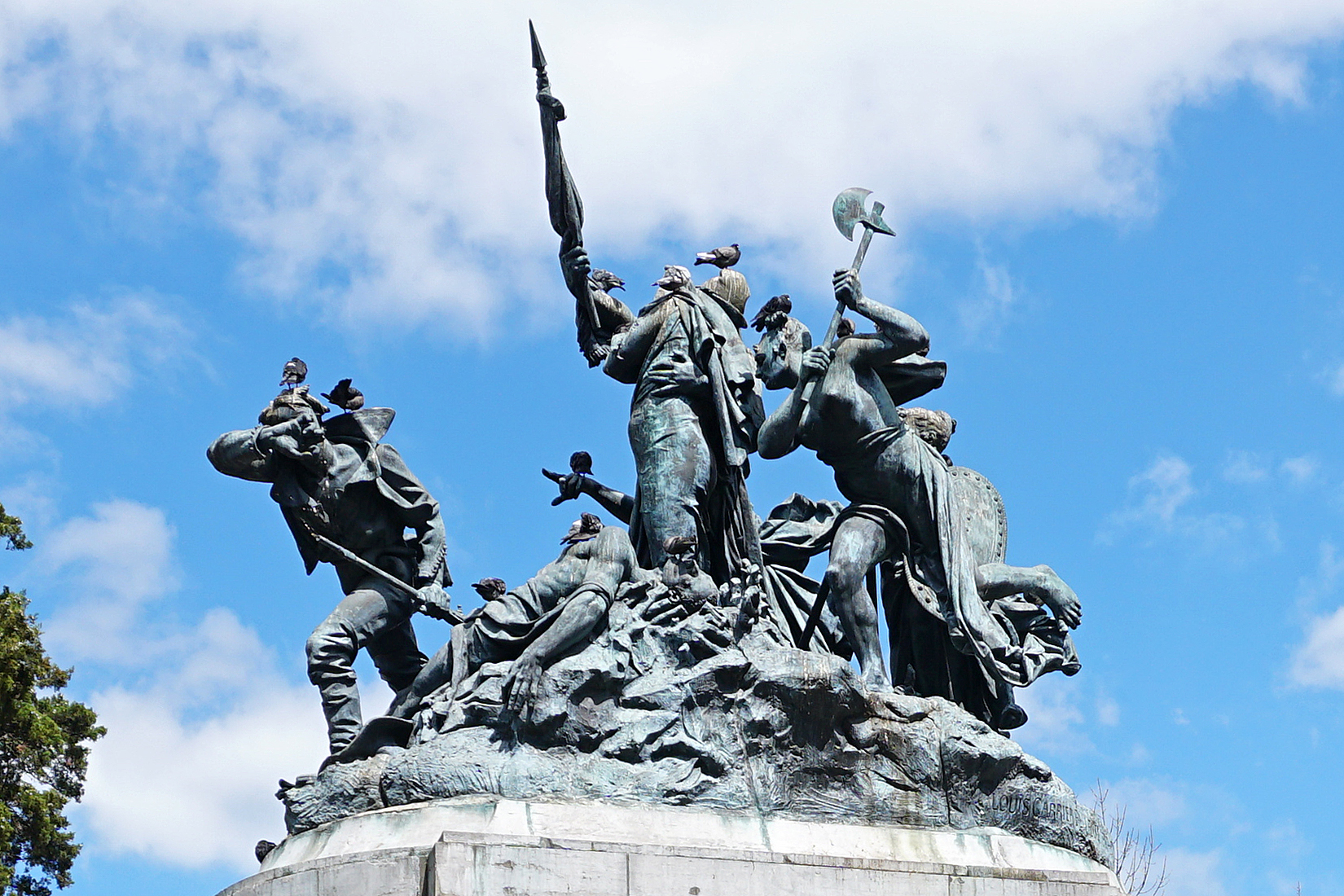 Primer plano del Monumento Nacional de Costa Rica, Parque Nacional, San José